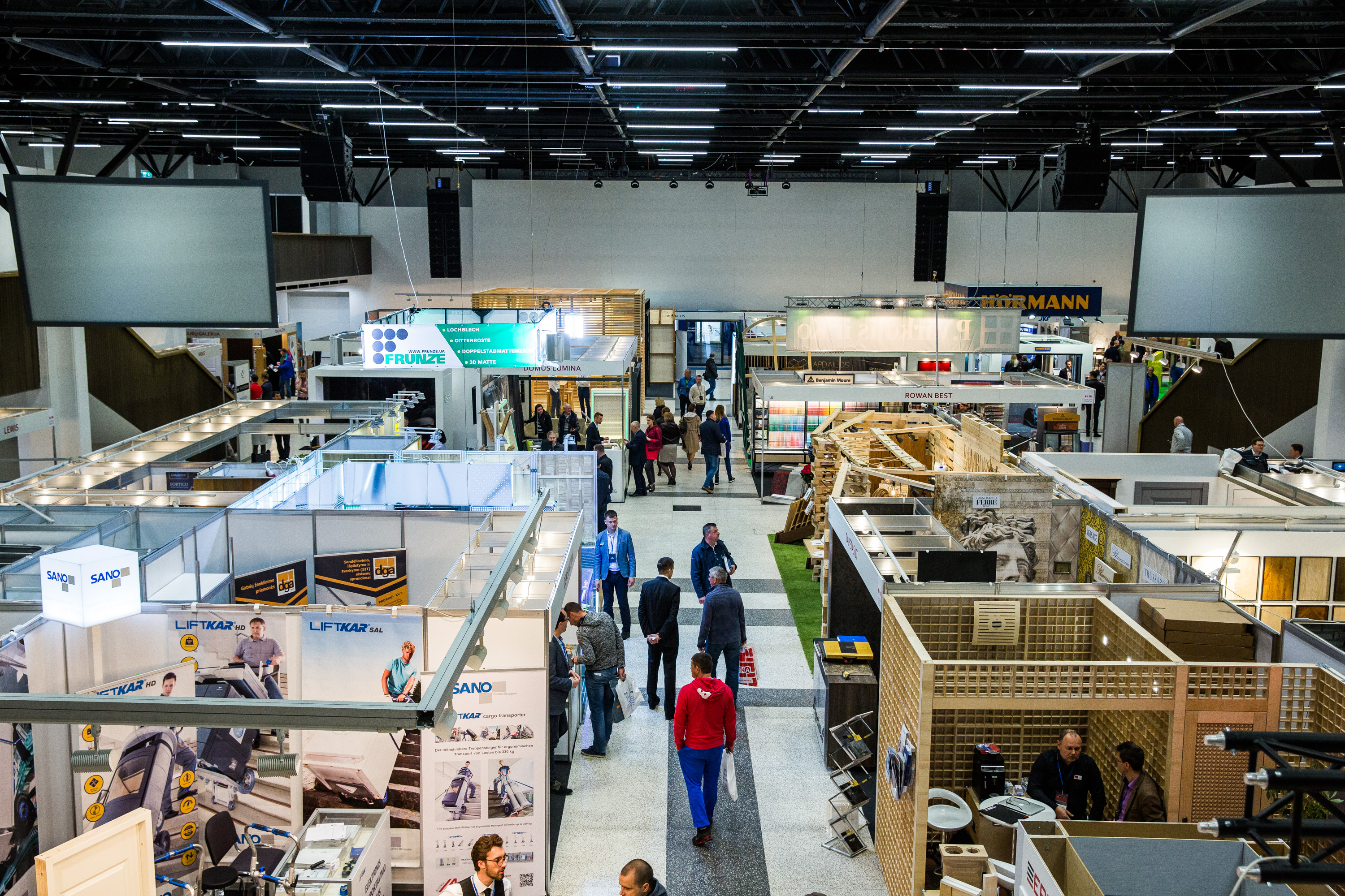 Paroda RESTA 2018